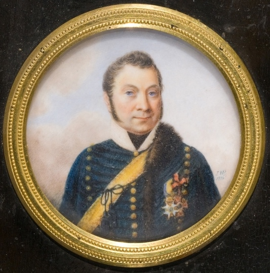 Carl Gustaf Flodin iklädd uniform m/1815 för en löjtnant vid Vendes artilleriregementes ridande bataljon. På bröstet bär han riddartecknet för Svärdsorden, samt riddartecknet av ryska Sankt Georgsorden. Avporträtterad av Johan Way år 1816.